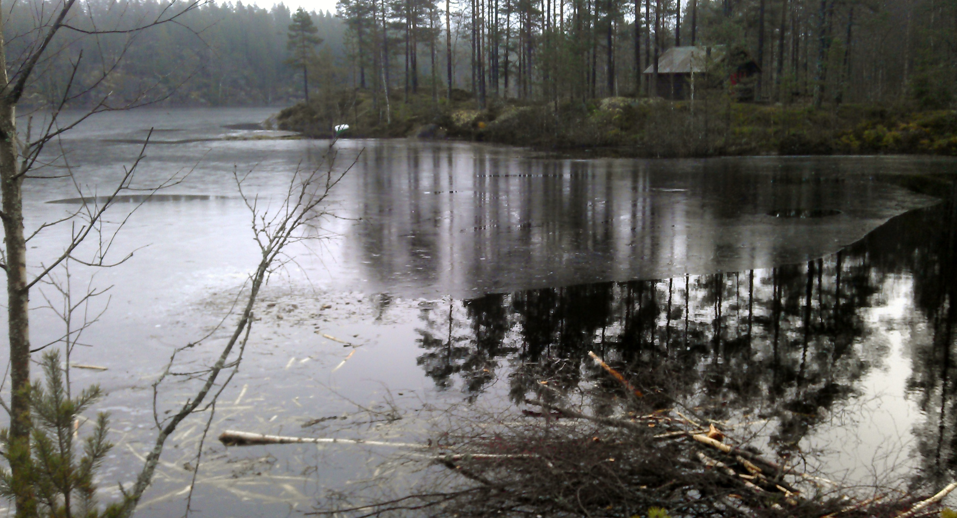 Sørenden av innsjøen Aurset i Aurskog-Høland kommune.